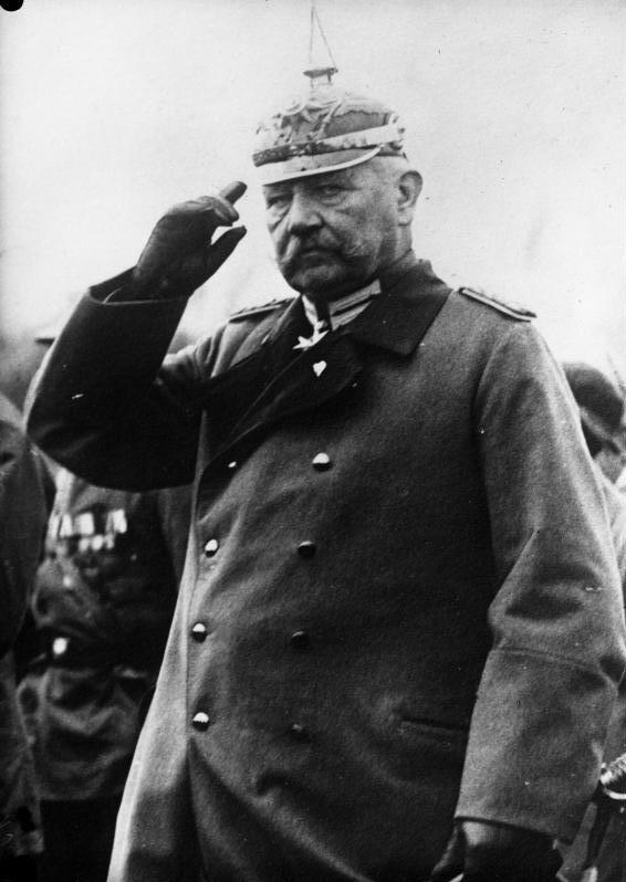 Paul von Hindenburg, deutscher Reichspräsident. Momentaufnahmen, aufgenommen bei politischen Veranstaltungen unter Anwesenheit von Hindenburg. Großaufnahme des neuen Reichspräsidenten.